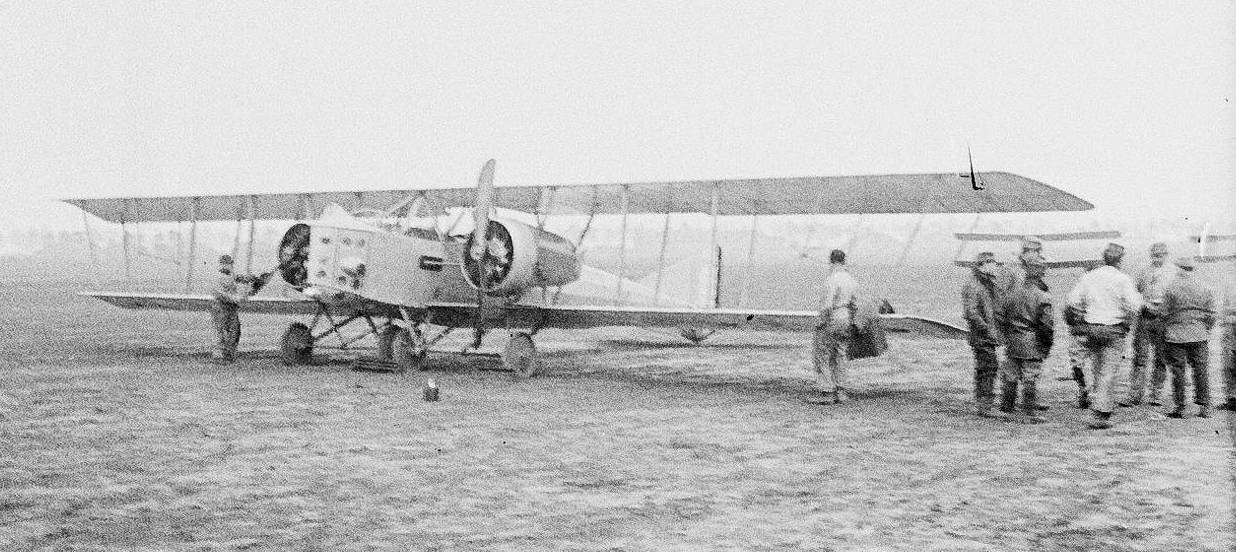 Vue d'ensemble d'un avion biplan Morane dans un champ d'aviation de la RGA (réserve générale de l'aviation) à Dugny (Seine-Saint-Denis). 1917. Guerre 1914-1918.